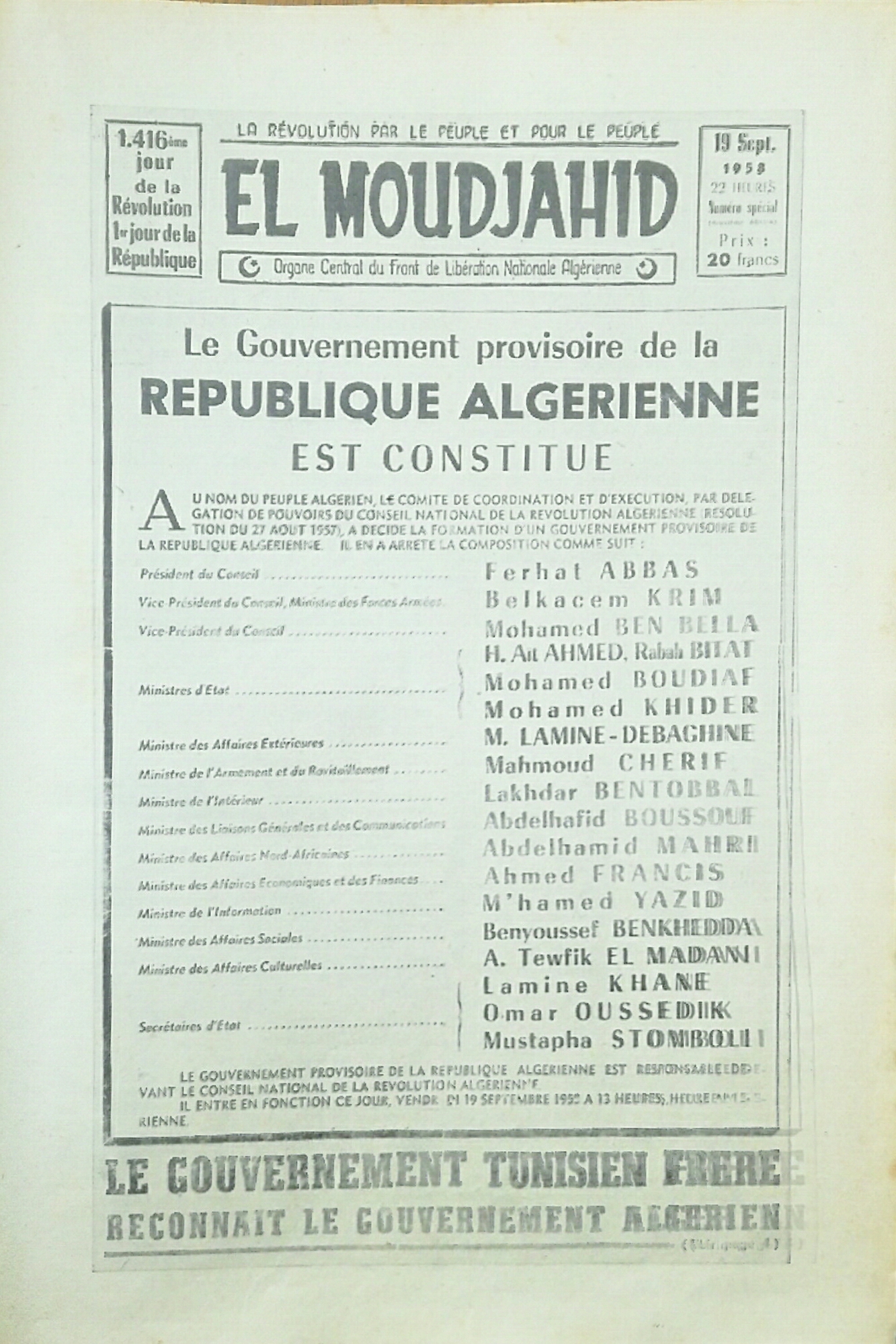 El Moudjahid Fr [29HS] - 19-09-1958 - Le Gouvernement provisoire de la Répoublique algérienne est constitué